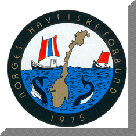 Logo for Norges Havfiskeforbund